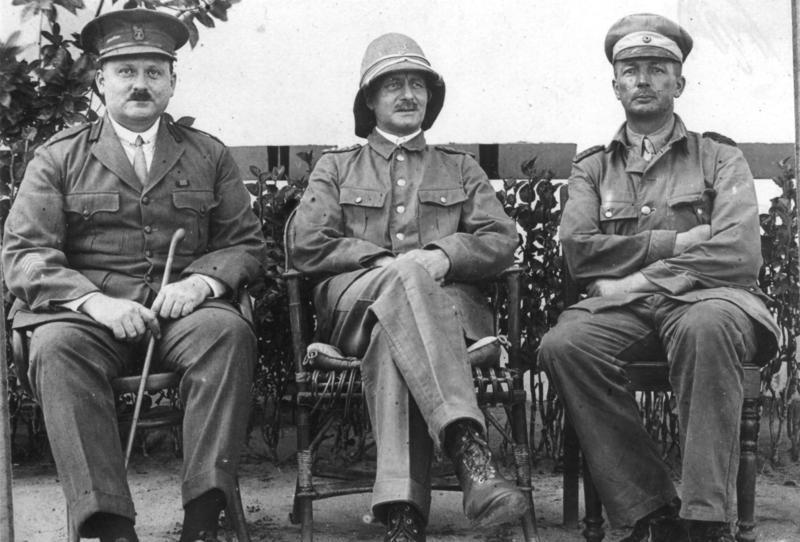 General von Lettow-Vorbeck in Daressalam, März 1919